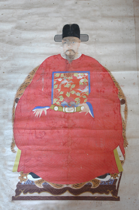 文言: 大明太子少保左忠毅公光斗字遺直，號浮丘。明南直隸桐城人也。